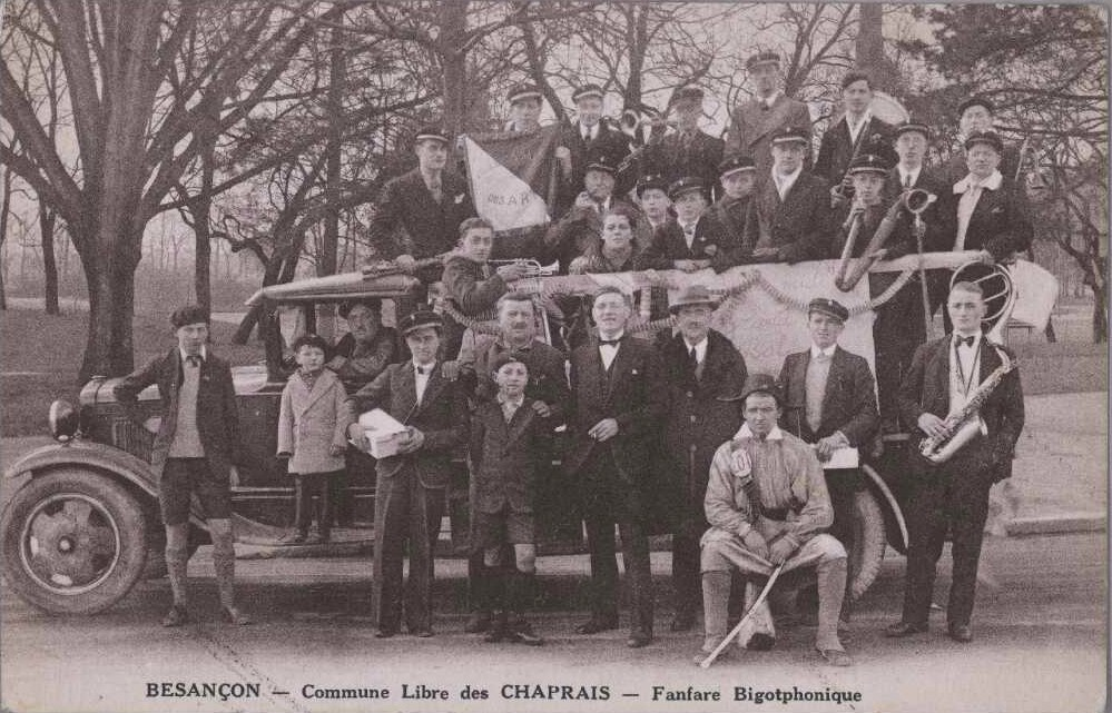 Vue de la Fanfare Bigotphonique de la Commune Libre des Chaprais à Besançon, photo prise entre 1904 et 1914. Une page Internet qui parle de la Commune Libre des Chaprais